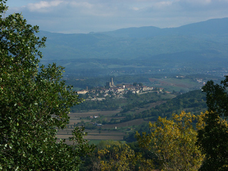 Poppi in Casentino